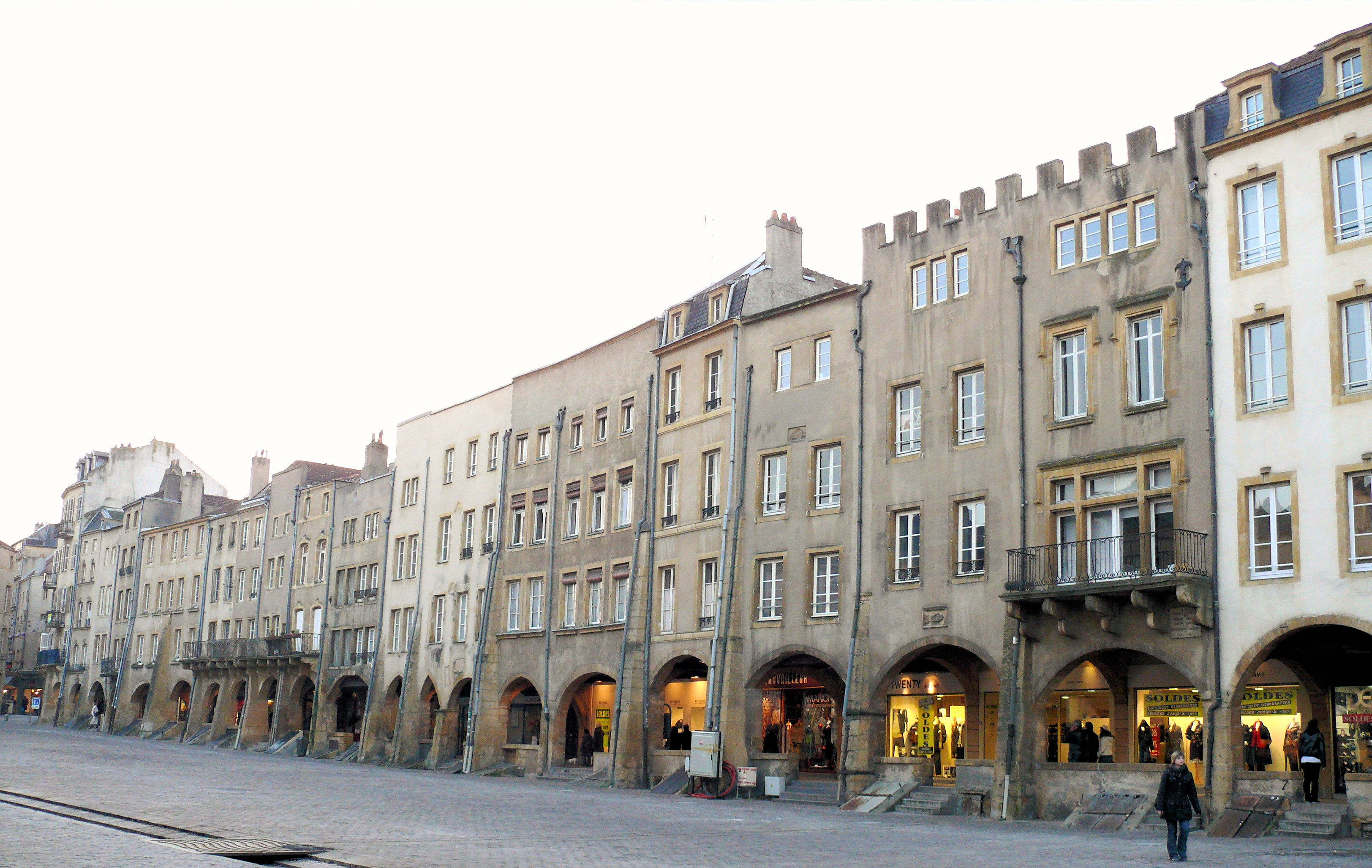 Metz - Place Saint-Louis